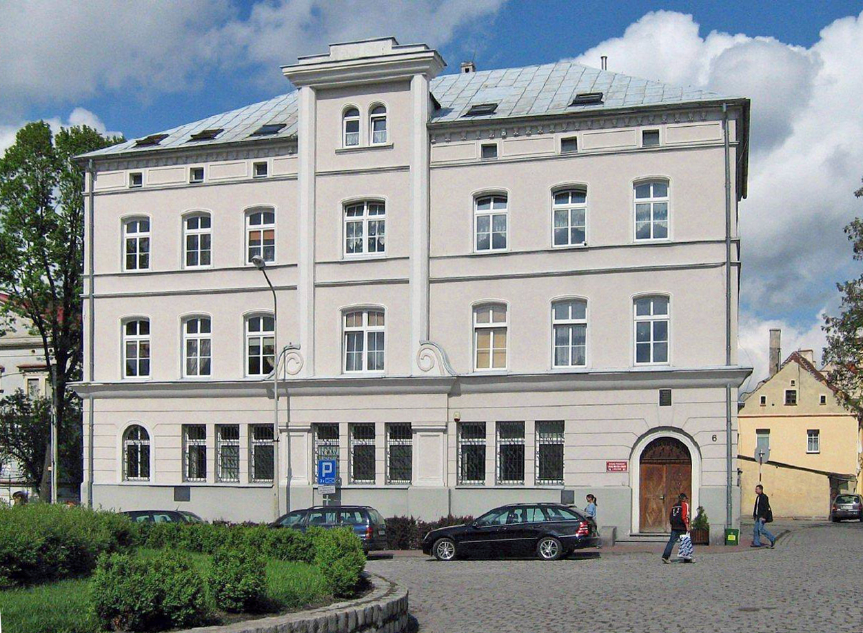 Urząd Miasta i Gminy - dawny bank NBP